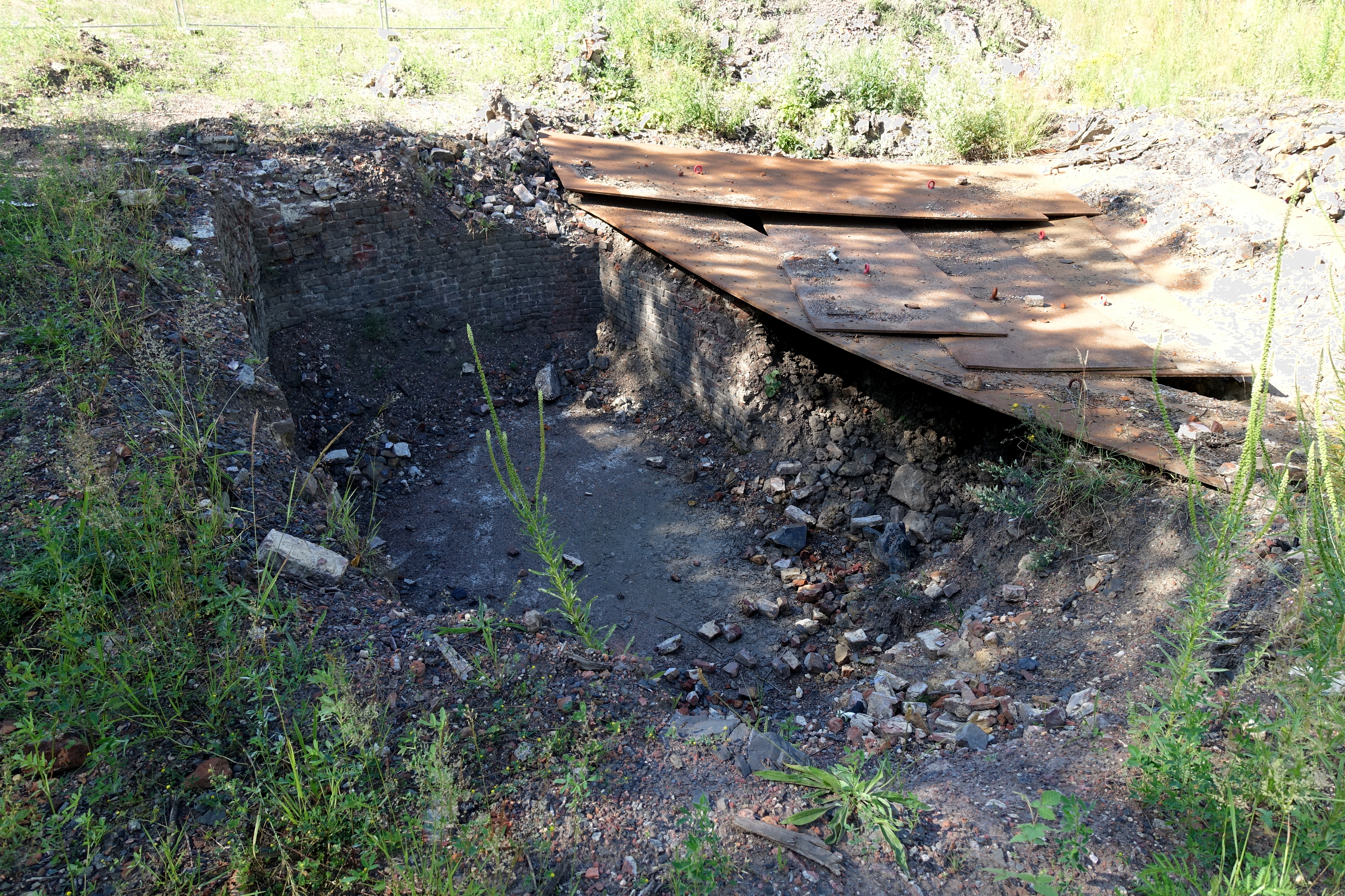 Verder dempen van de put van de Charbonnage de Lonette in Retinne (Fléron) in 2019.